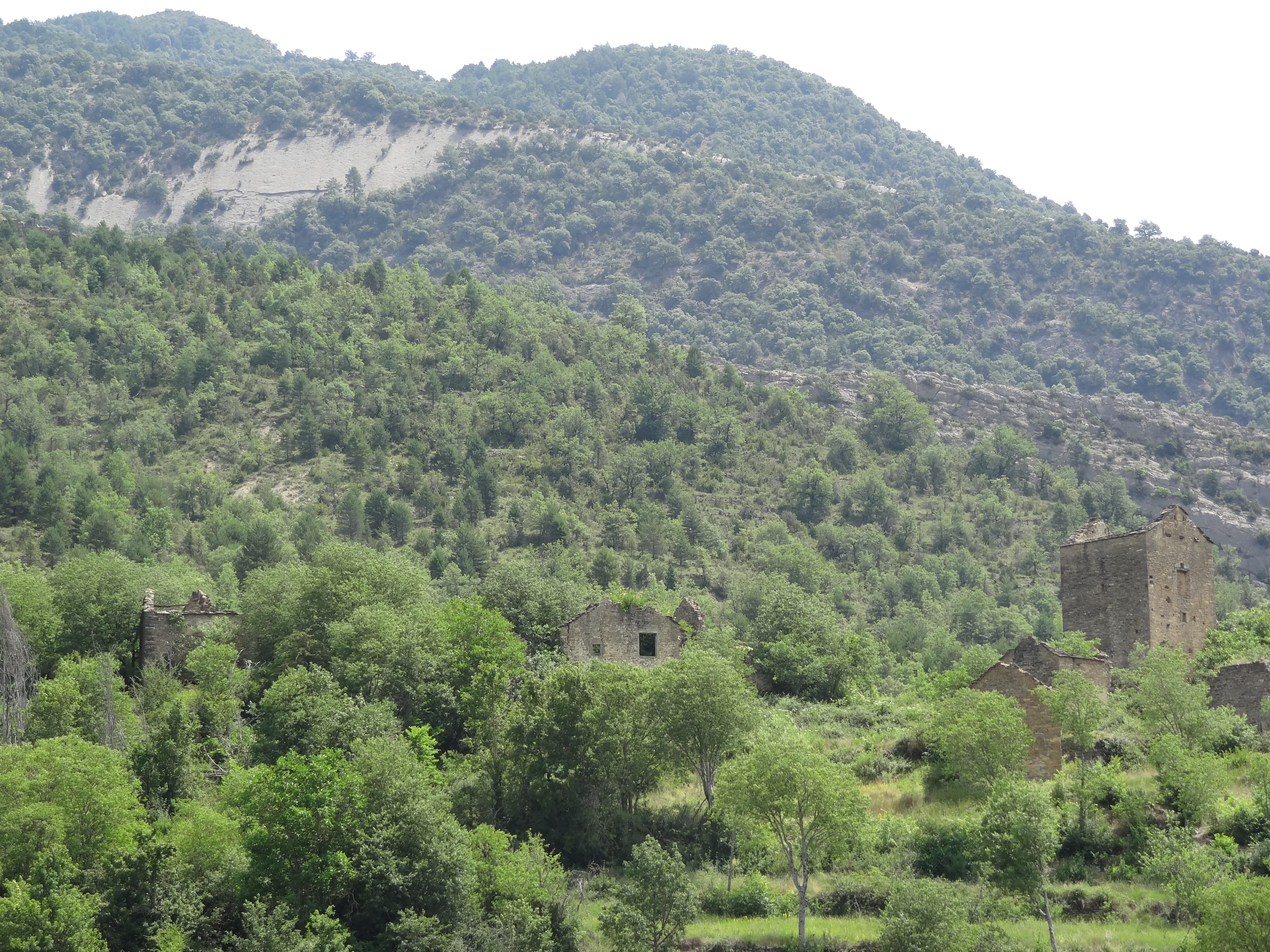 Lavelilla